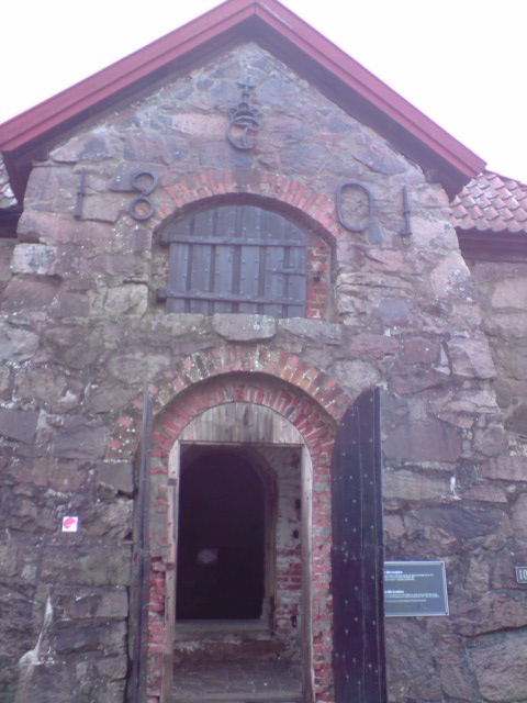 Inngangspartiet til Lille kruttårn med årstallet (for den lille hvelvingen) 1801 og Christian VIIs monogram